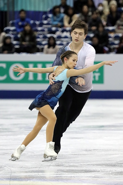 Дарья Павлюченко / Денис Ходыкин (Россия) на финале юниорского Гран-при 2017-2018